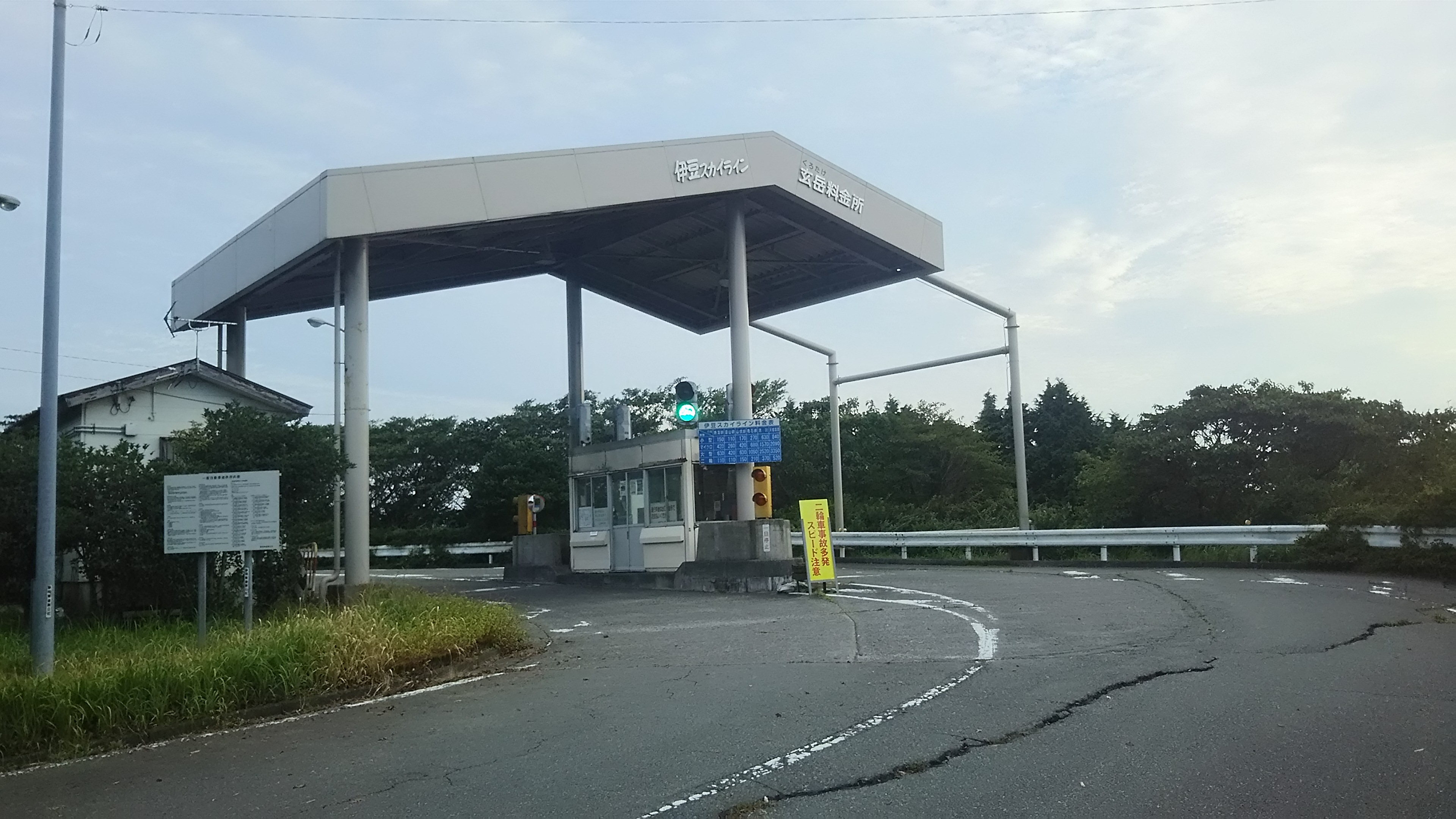 静岡県熱海市にある伊豆スカイライン玄岳インターチェンジ料金所